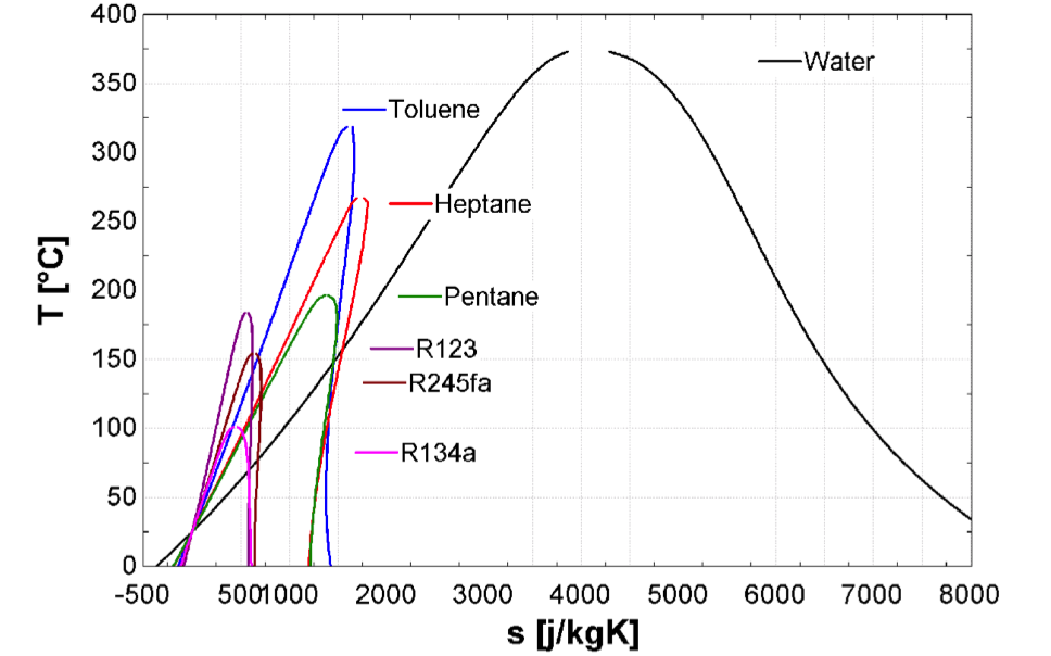 Dijagram krivulja napetosti različitih fluida